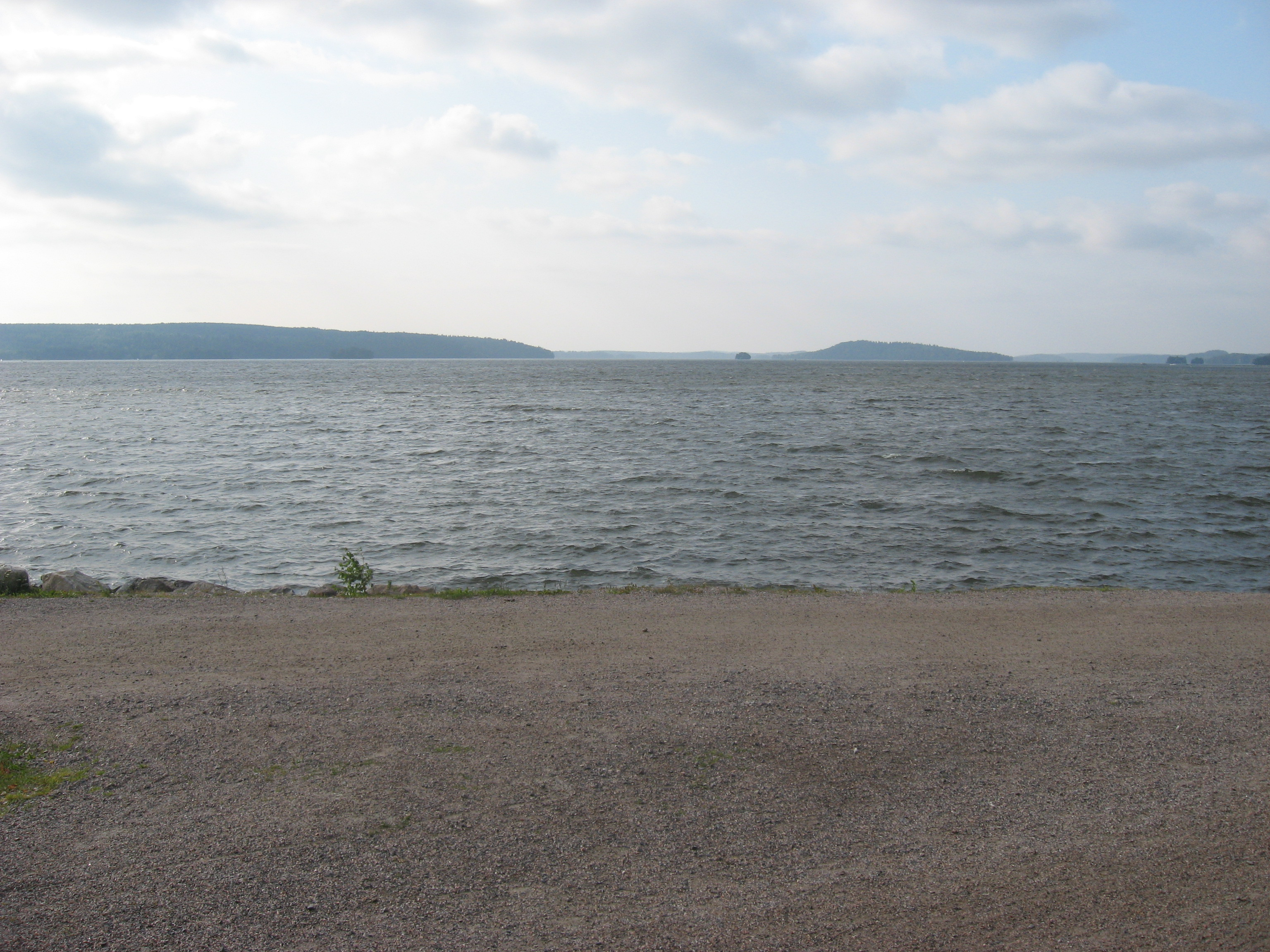 Vesijärvi satamasta katsoen